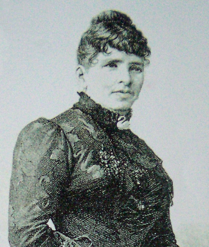 Portrait of Jacinta Parejo de Crespo.